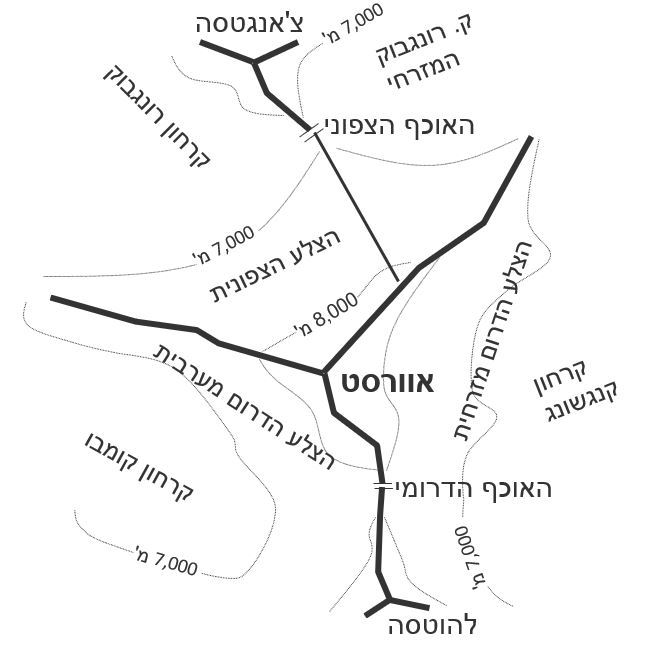 מבנה ההר וסביבתו